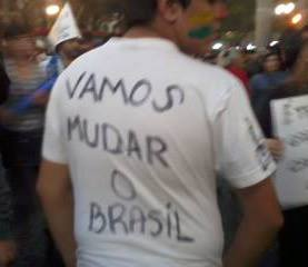 Manifestante protesta na Praça da Sé, em São Paulo.